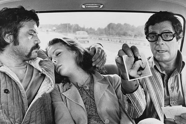 Da sinistra: gli attori Oliver Reed, Carole André e Marcello Mastroianni in uno scatto di scena sul set del film Mordi e fuggi (1973) di Dino Risi. Licensing 1973 1973 1973